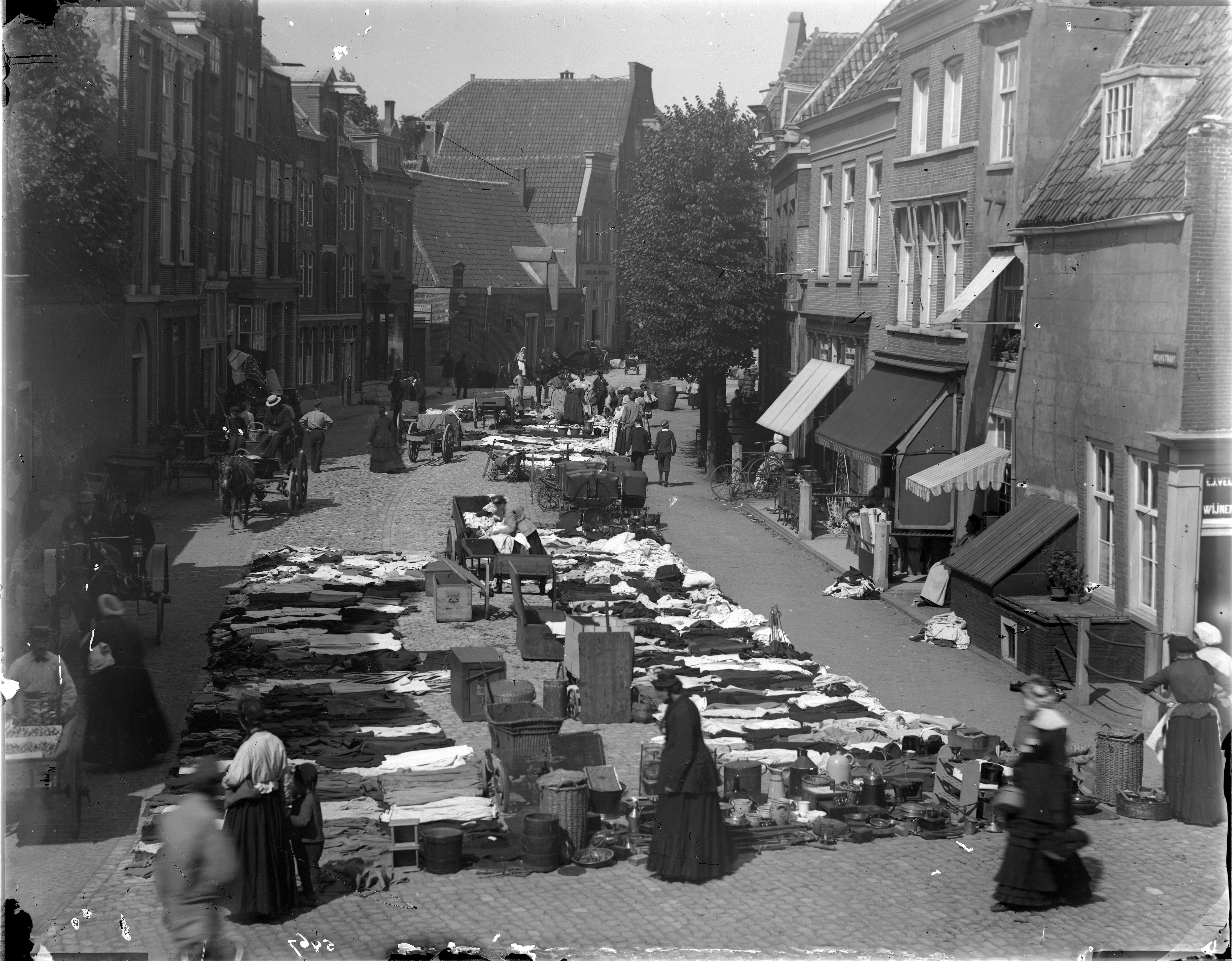 Markt in tweedehands spullen op de Nieuwstraat vanuit de bovenverdieping van een huis aan de oostzijde van de Hooigracht naar het westen gezien.